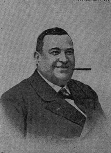 Adam Engelbert česko-německý spisovatel